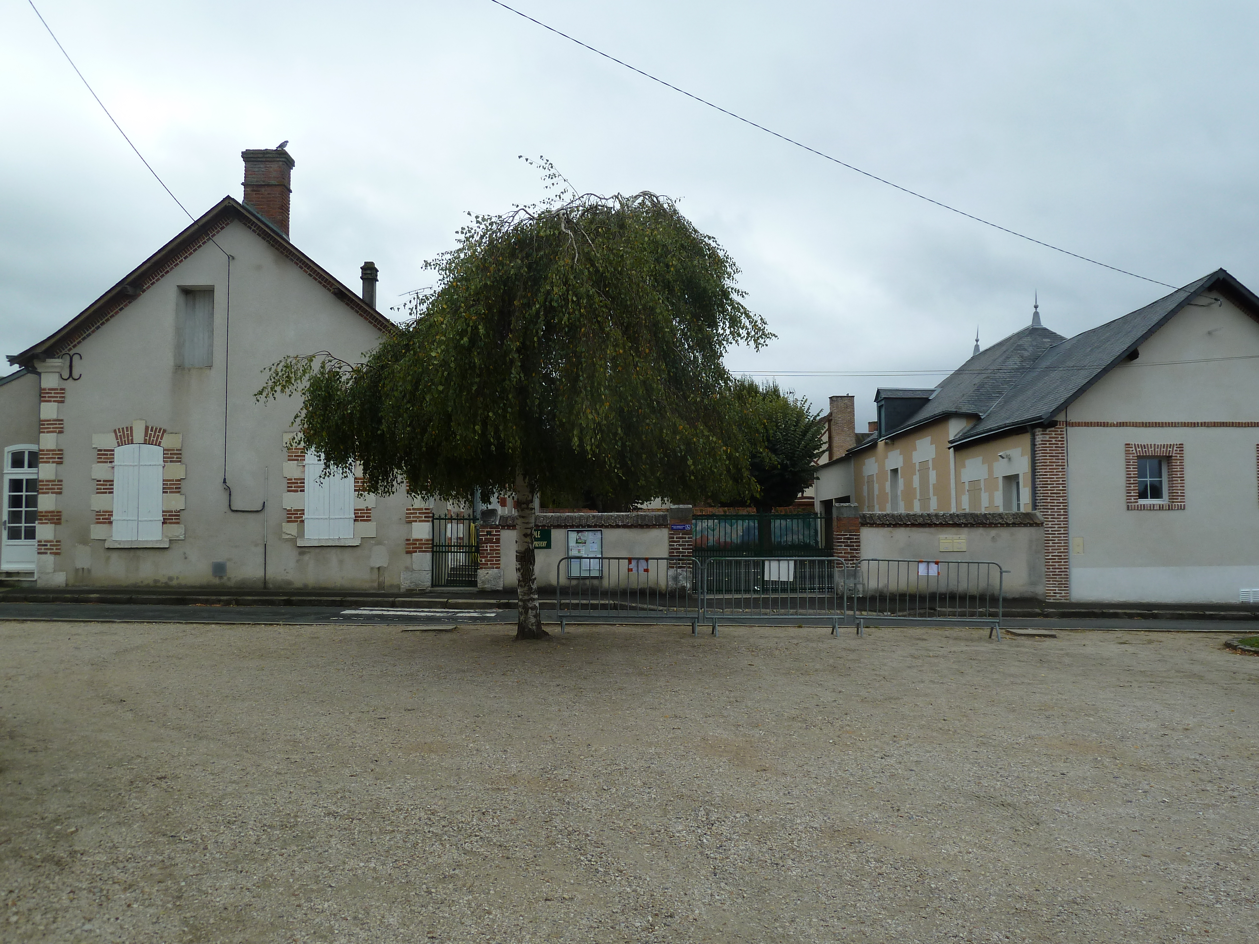 École primaire publique Jacques Prévert Millançay Loir-et-Cher